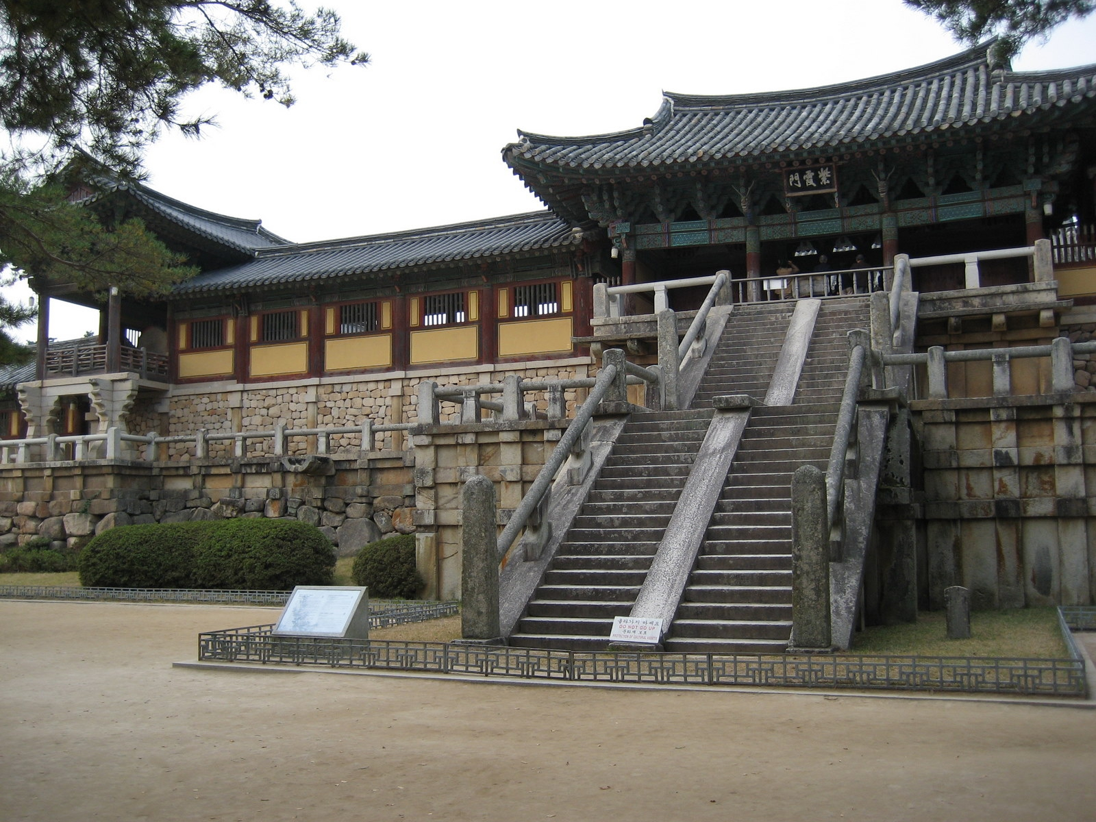 Bulguksa Temple